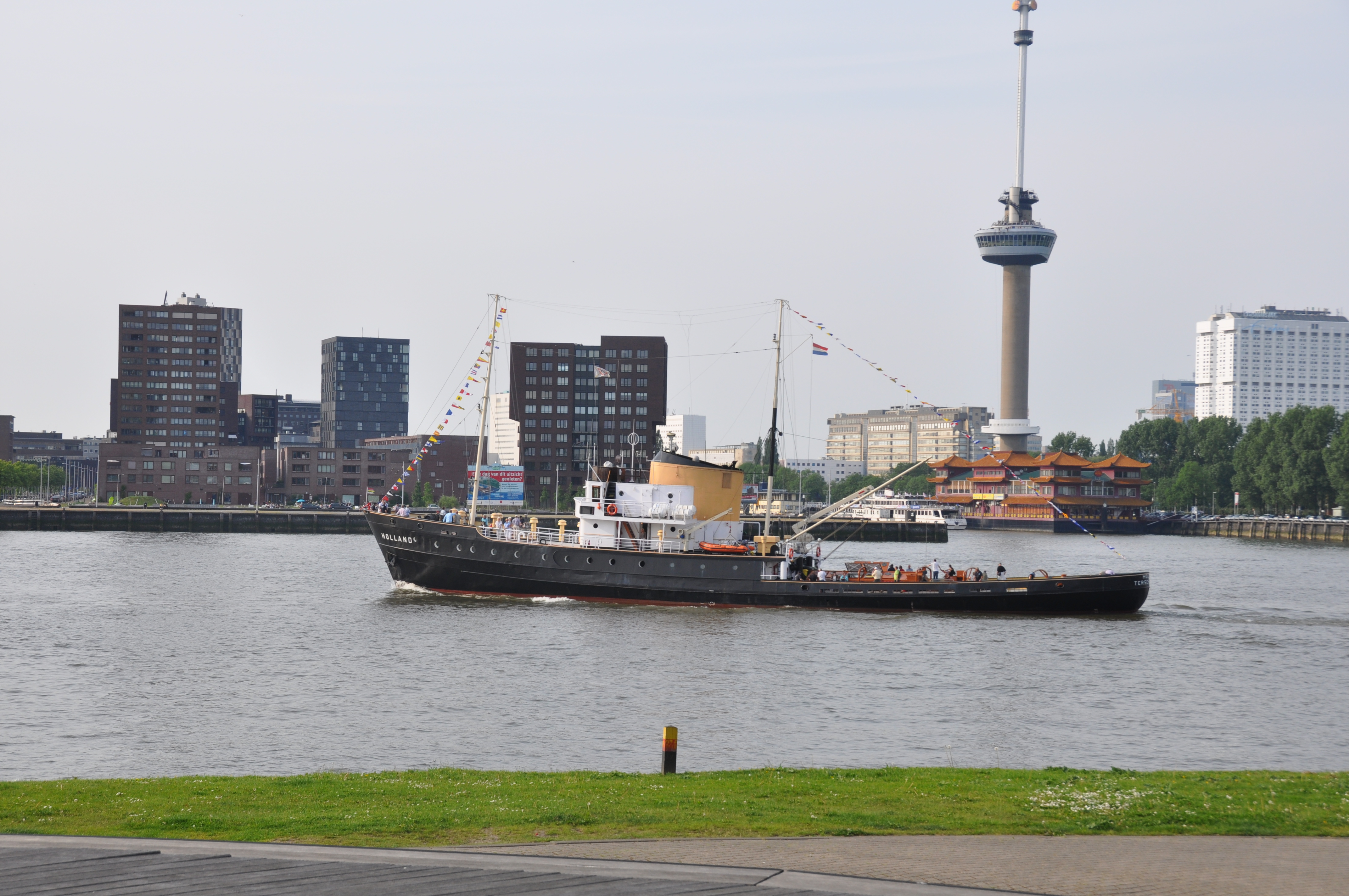 De HOLLAND op de Nieuwe Maas in Rotterdam.